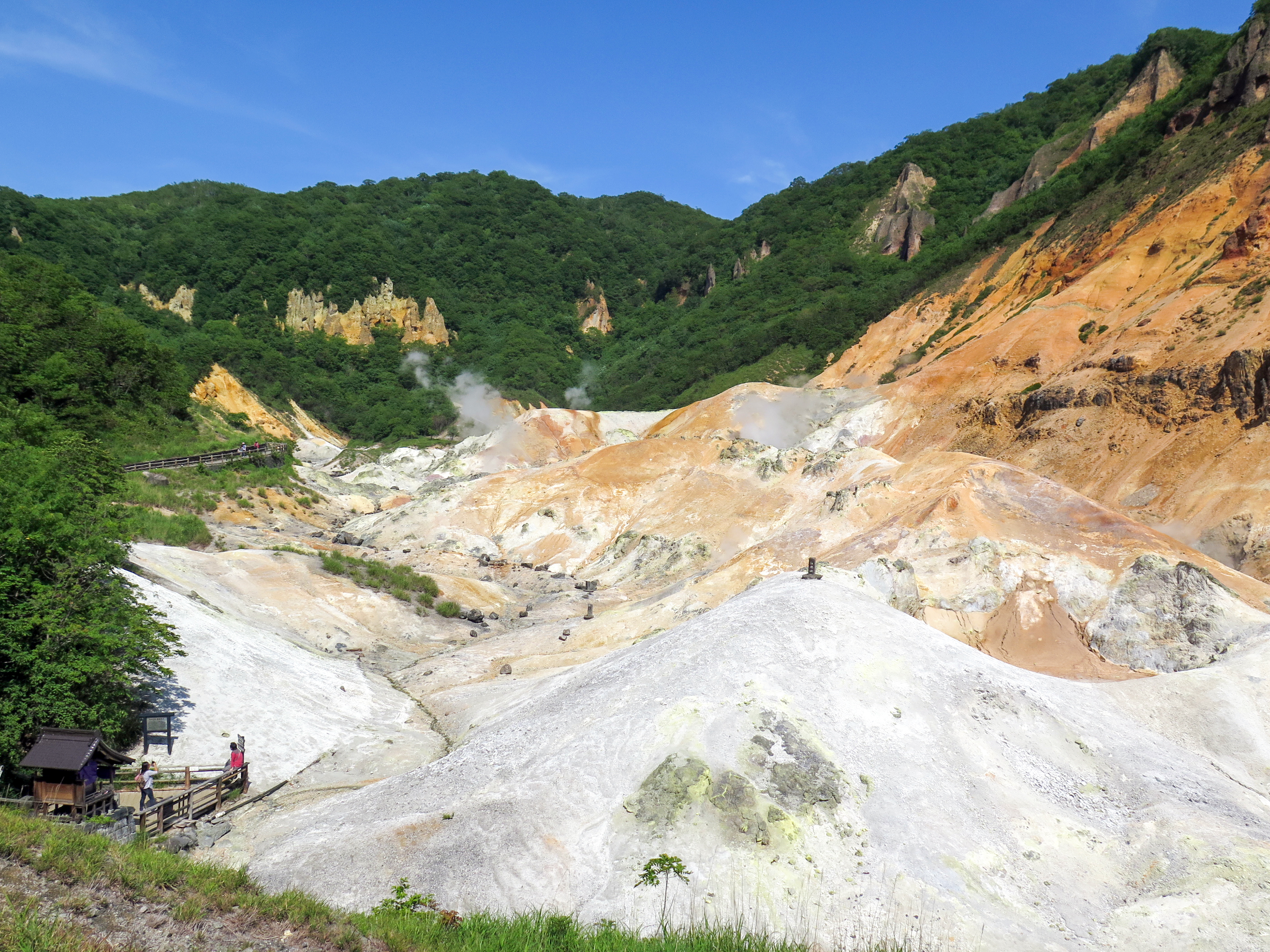 Noboribetsu Jigokudani (Hell valley)